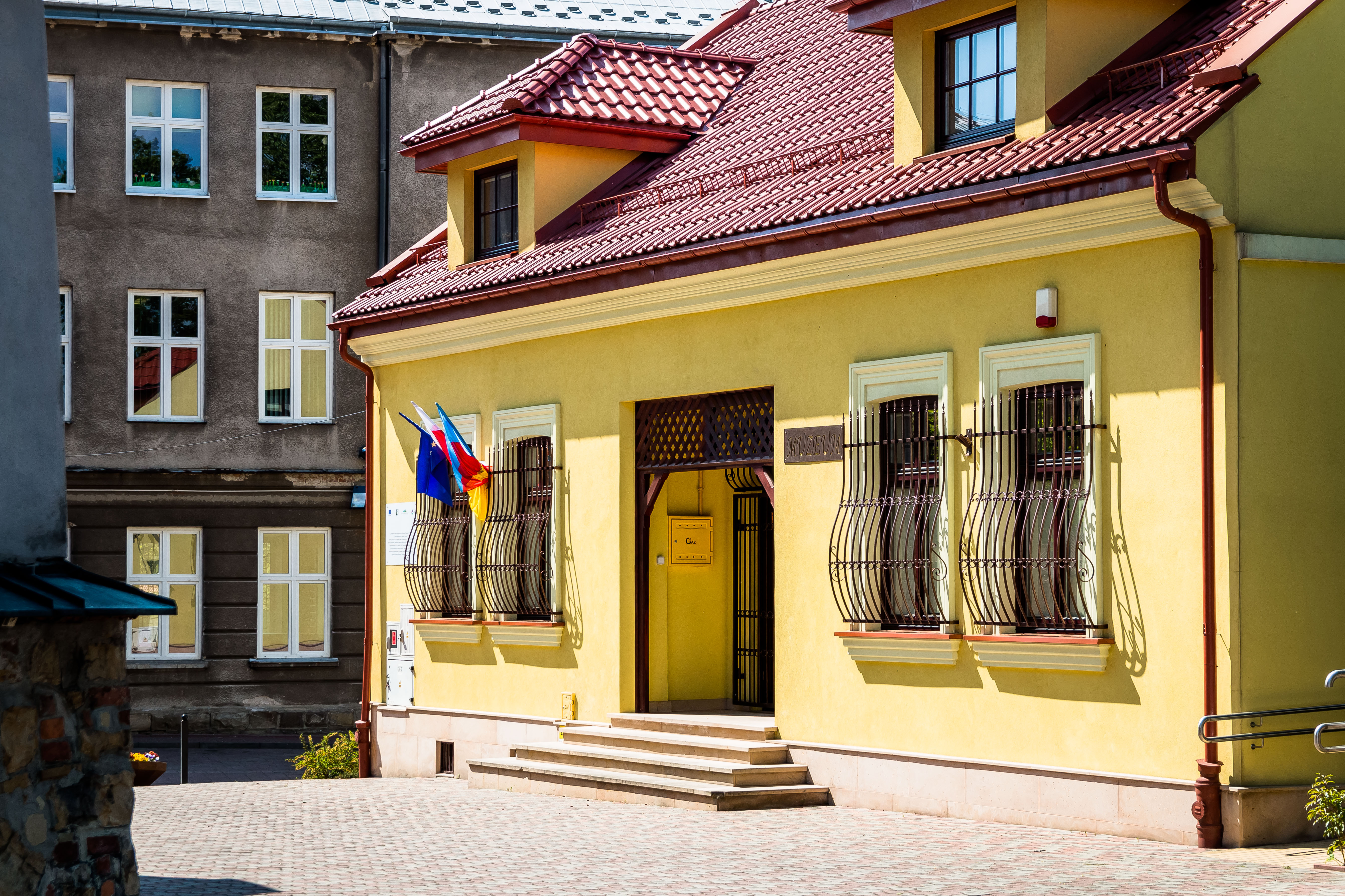 Budynek Muzeum Regionalnego w Pilźnie, odnowiony w 2012 roku, a oddany do użytku rok później.